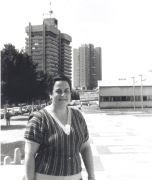 Museóloga